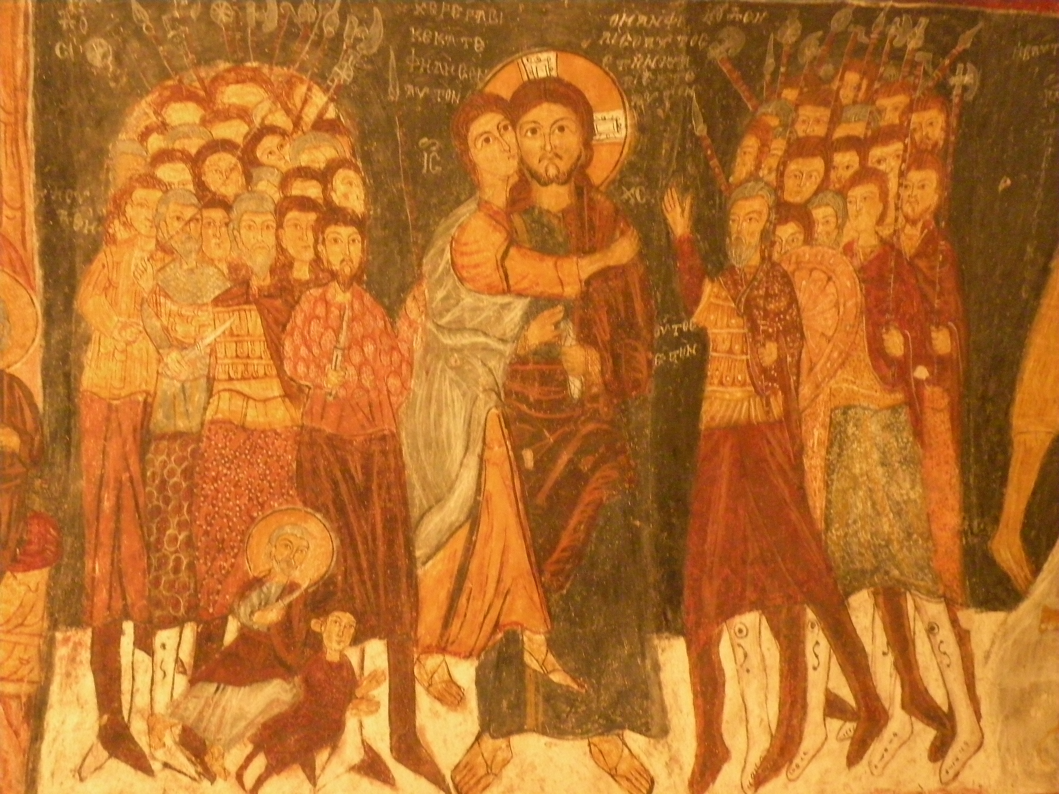 Fresko der "Judaskuss"-Szene in der Johanneskirche, Gülşehir, Kappadokien, Türkei